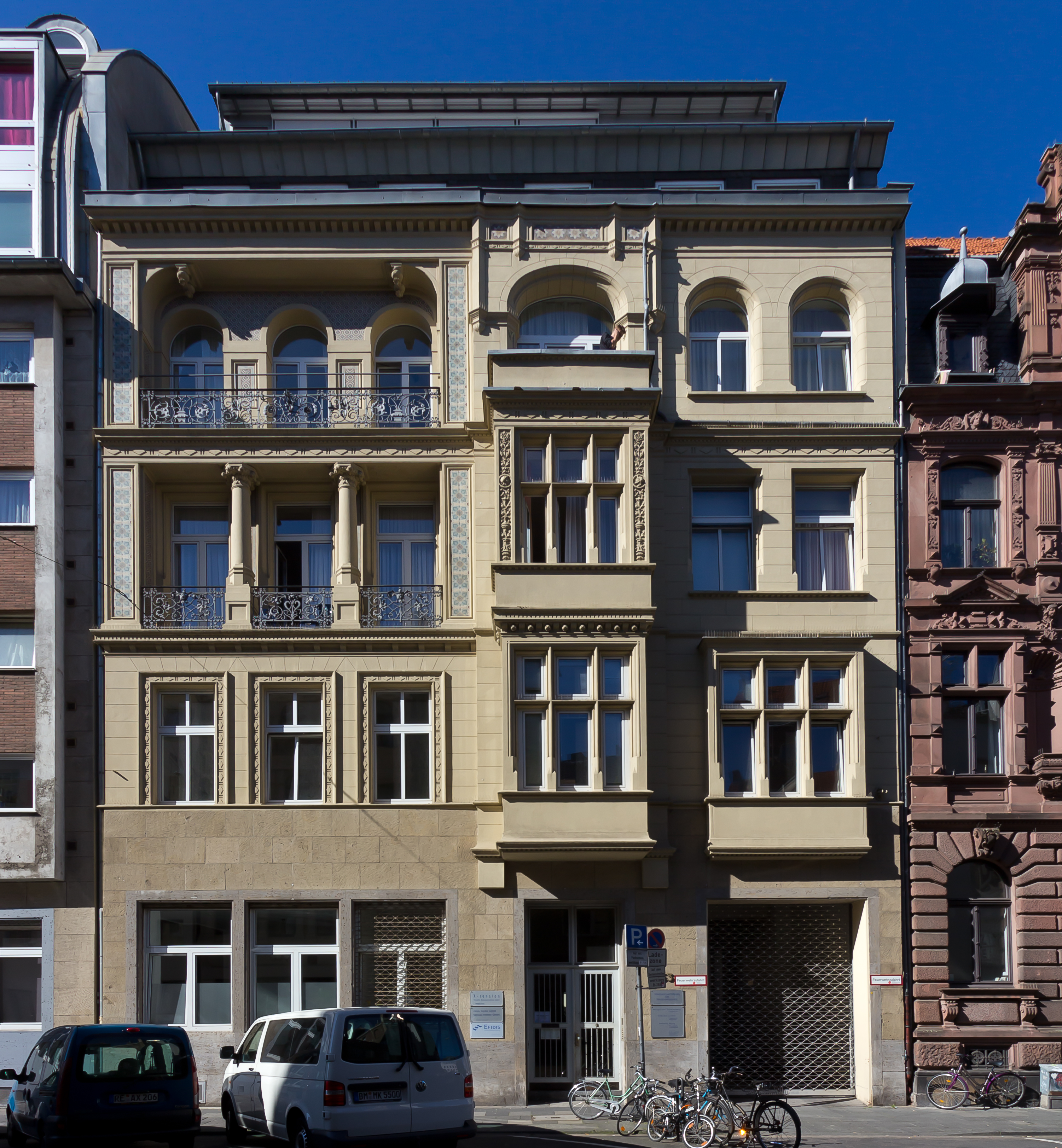 Denkmalgeschütztes Wohnhaus im Jugendstil, Bauzeit: 1906-1908